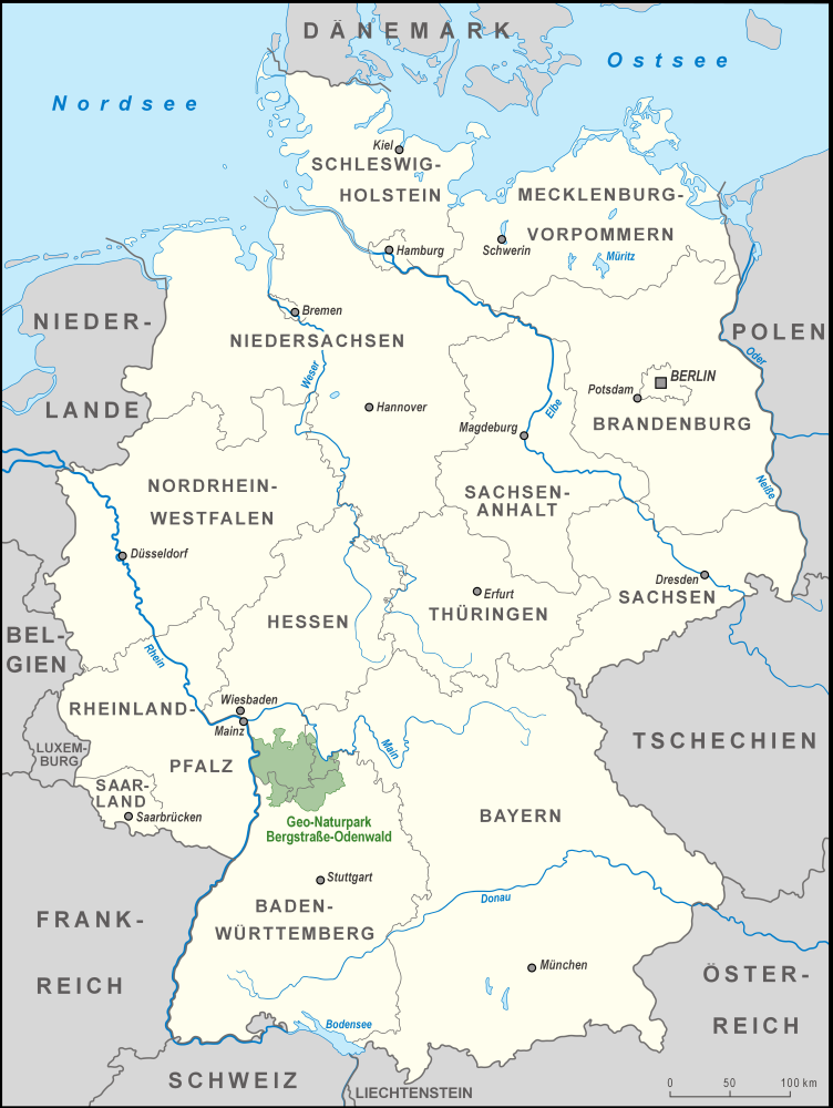 Karte des Geo-Naturparks Bergstraße-Odenwald in Deutschland